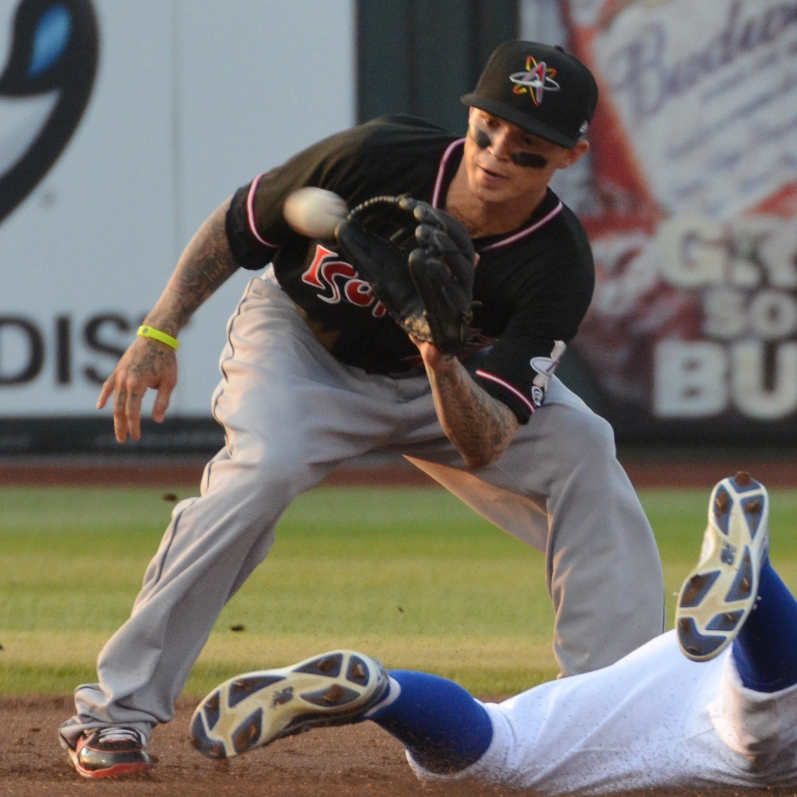 Justin Sellers